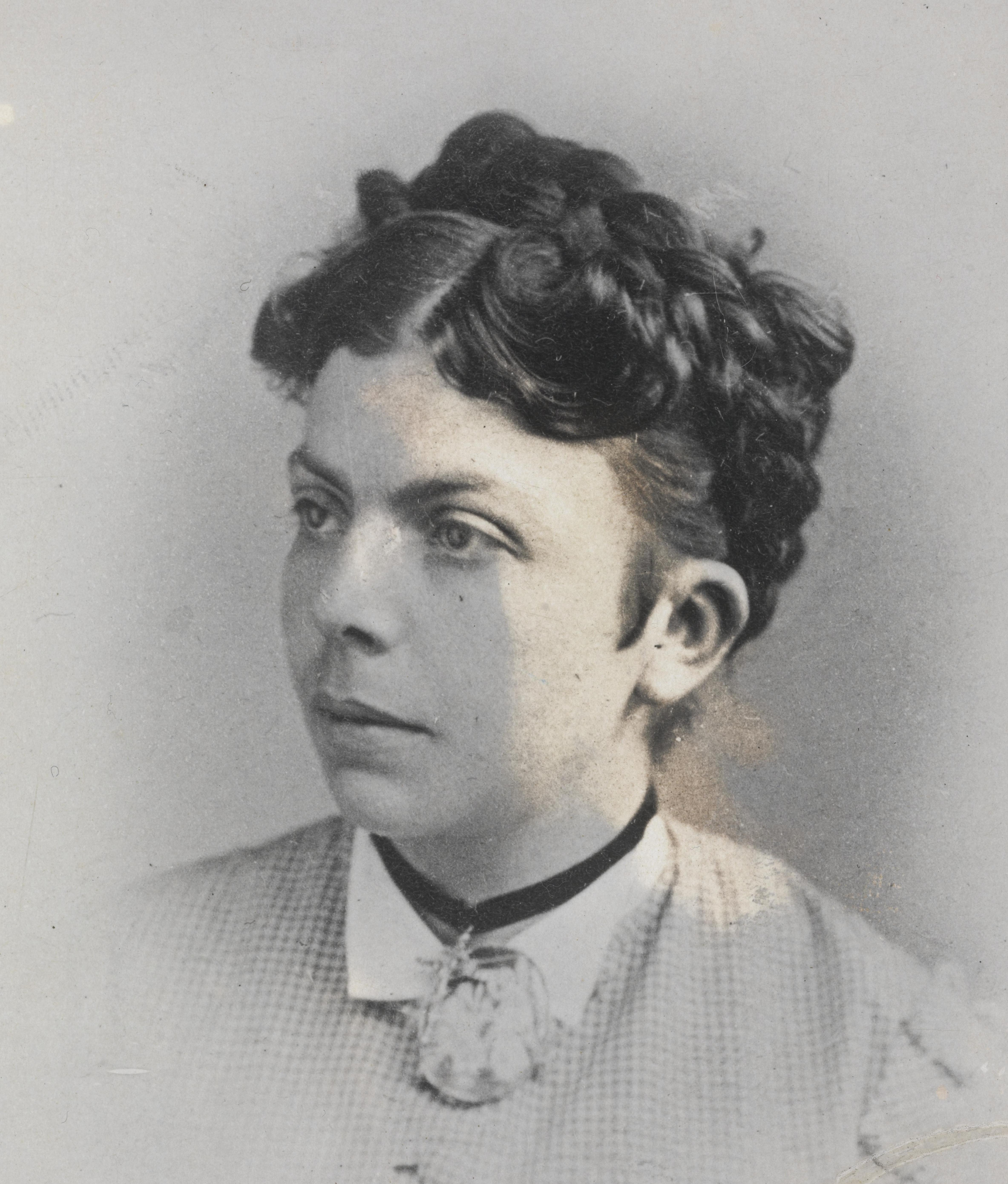 Bildet er hentet fra Nasjonalbibliotekets bildesamling Depicted person: Ibsen, Suzannah